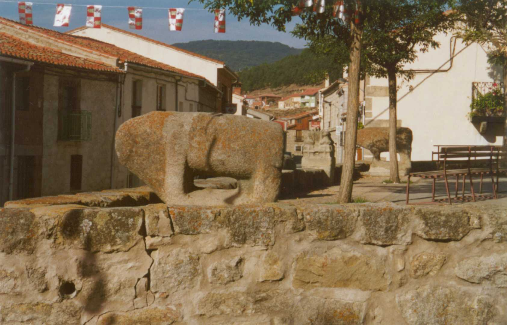 VILLATORO (AVILA, ESPAÑA)